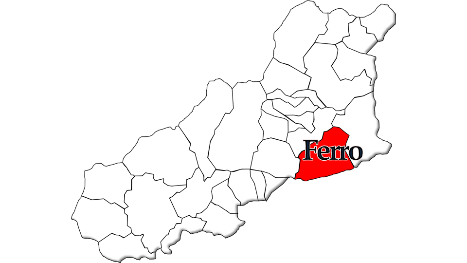 População